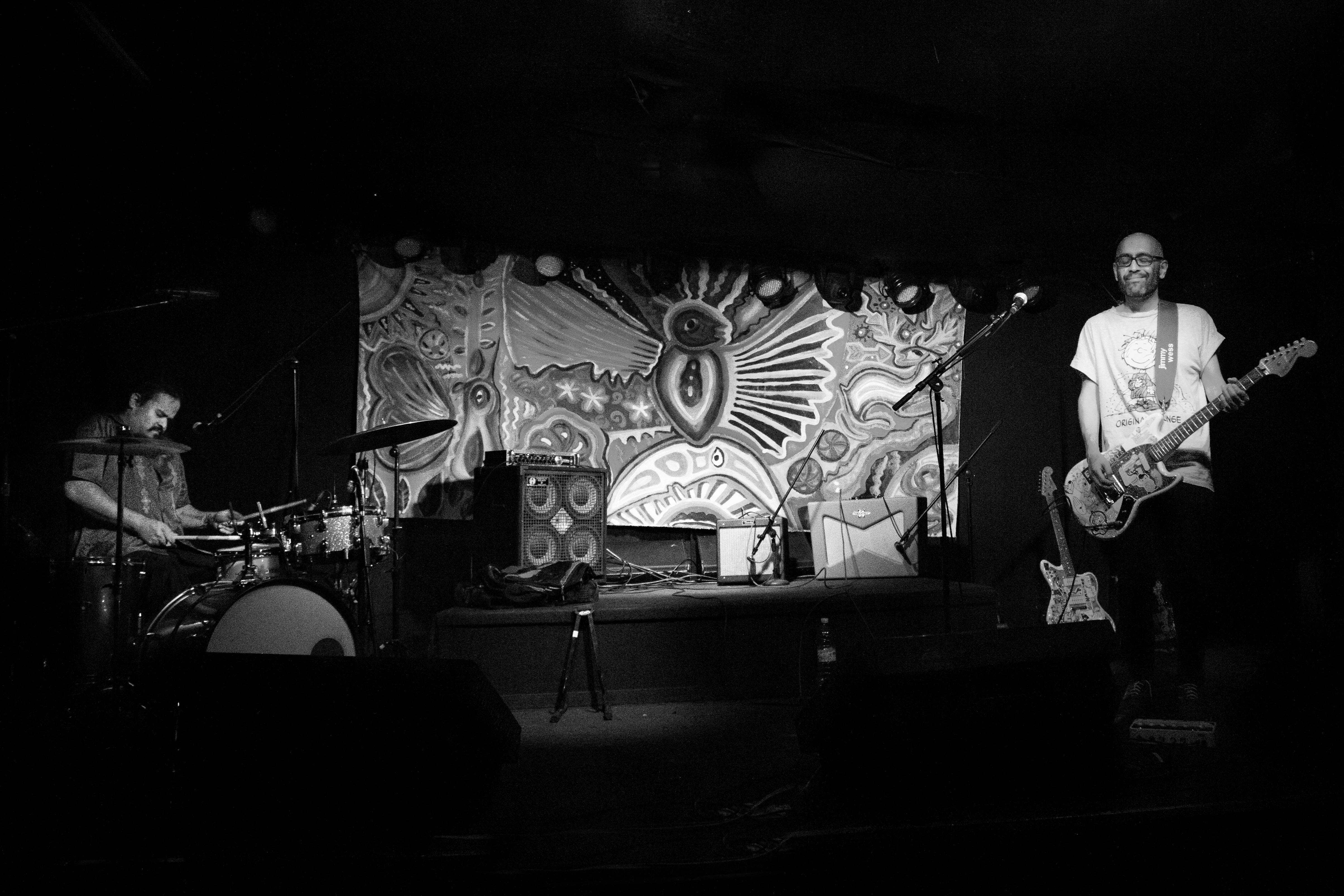 Yokozuna en Multiforo Alicia (2018) por @MiauLaRoja